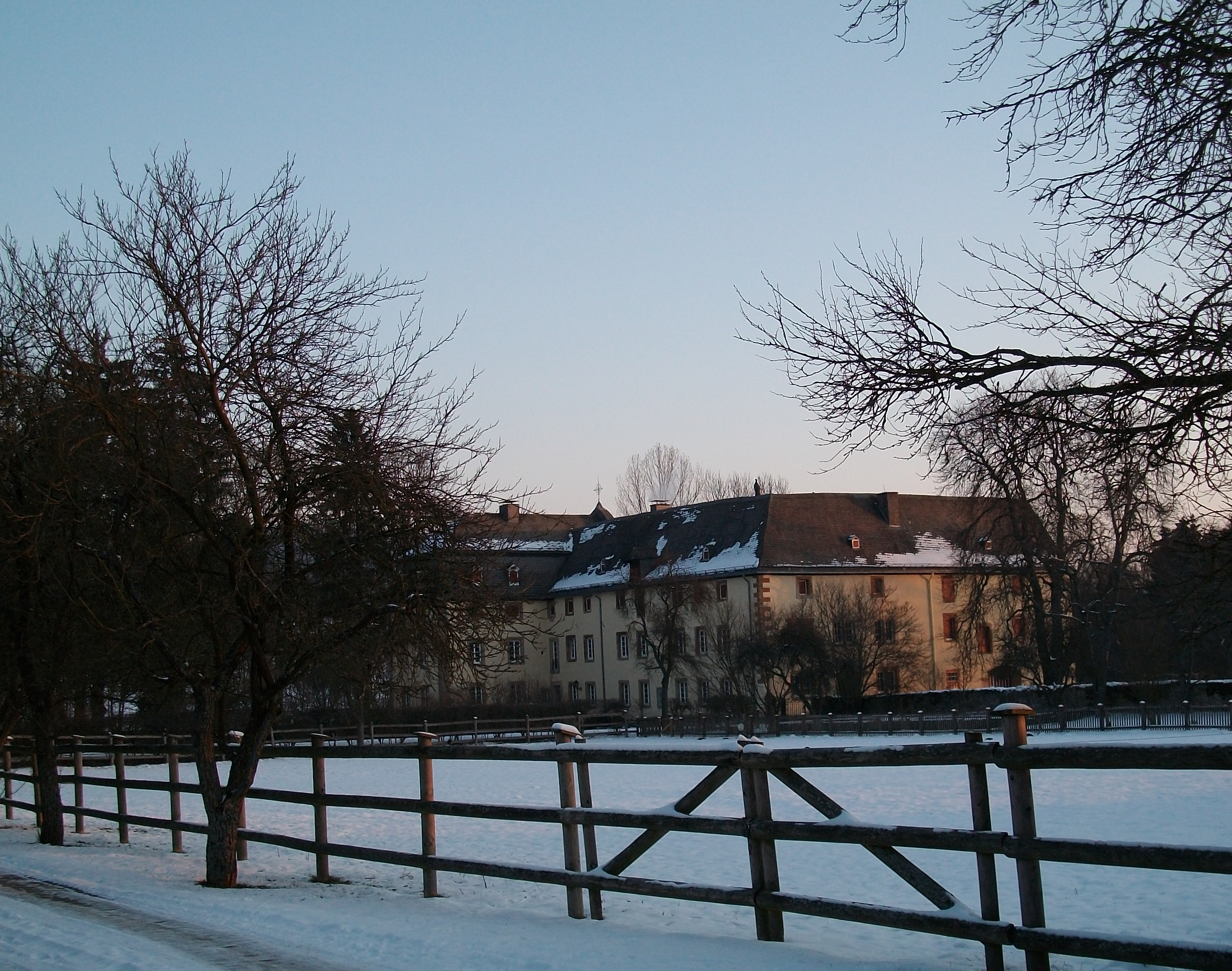 Kloster Glindfeld, Medebach, Konventsgebäude des ehemaligen Kreuzherrenklosters, Südflügel Anno 1694 (Germany)